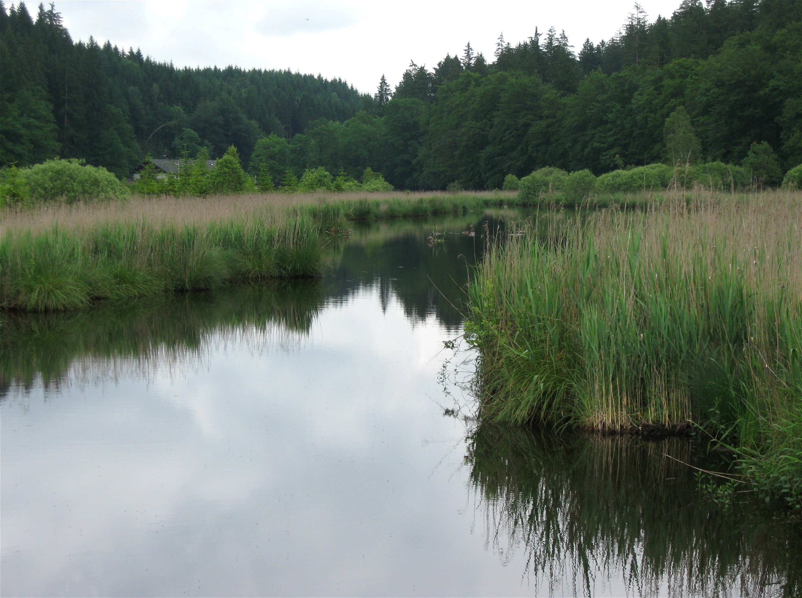 Zufluss des Deininger Weihers, Straßlach-Dingharting